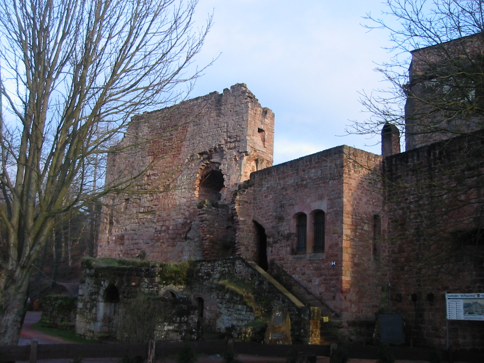 Burg Nanstein 66849 Landstuhl